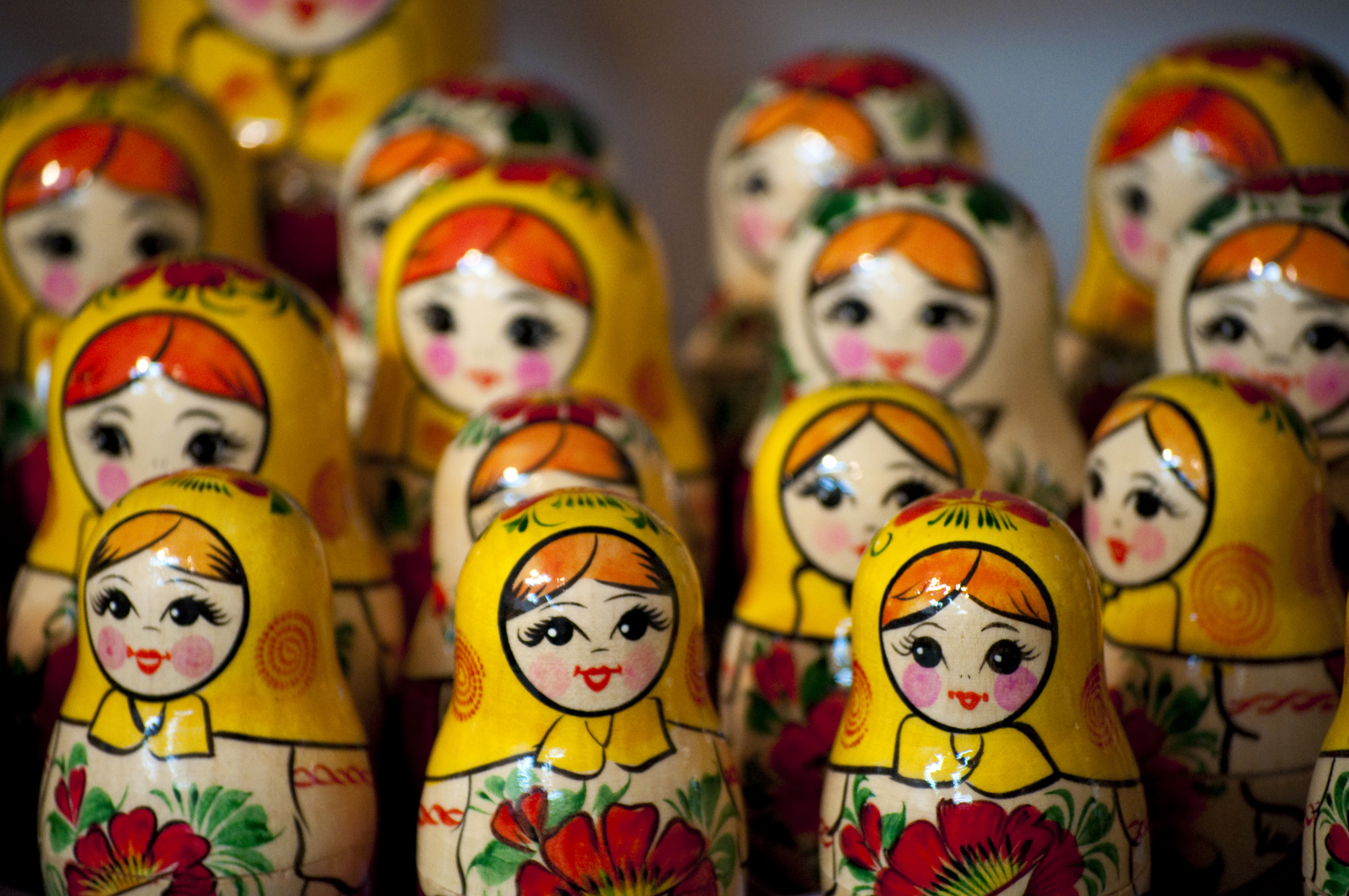 Matryoshka Dolls